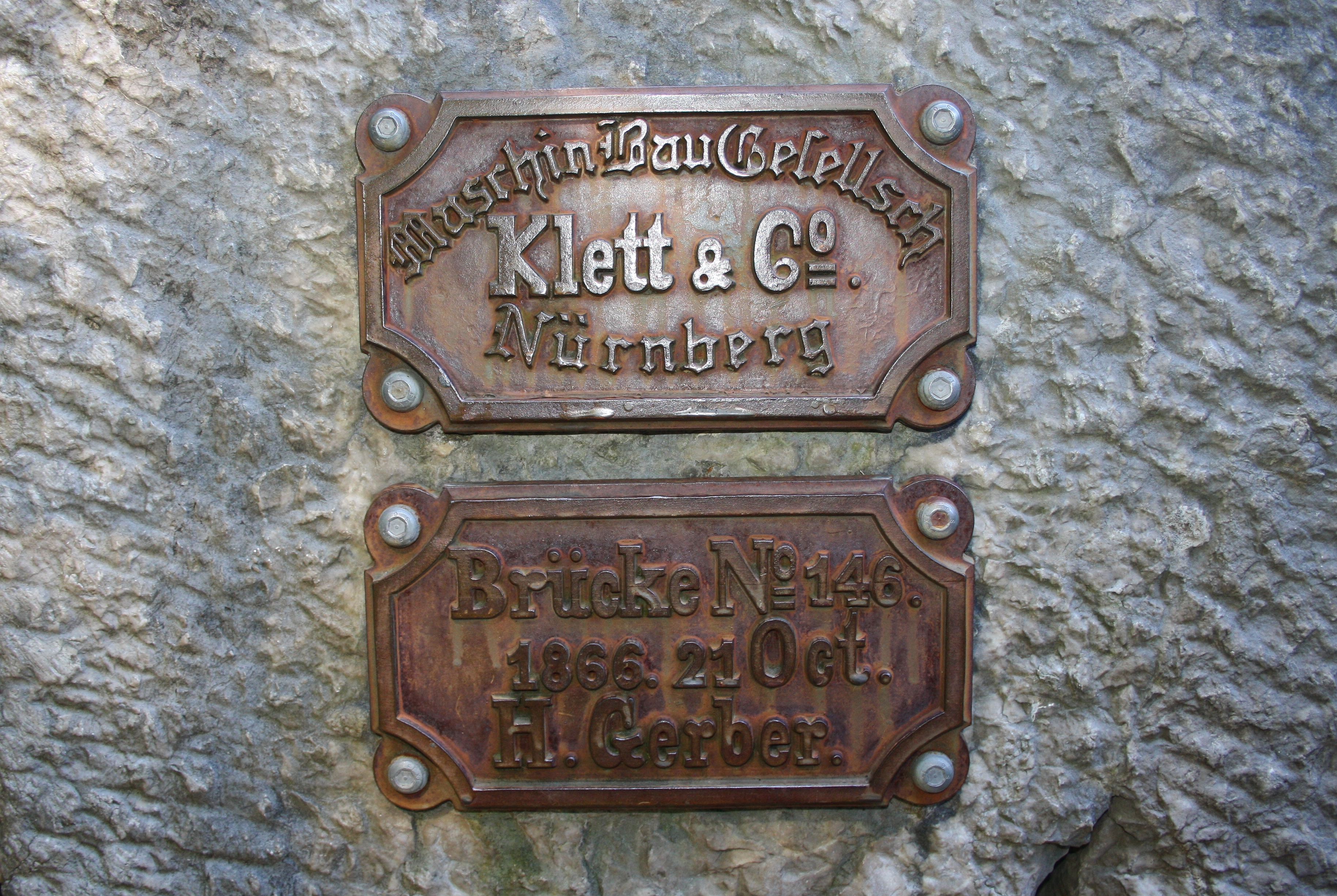 Schild Klett & Co. (1866) auf der Marienbrücke am Schloss Neuschwanstein.